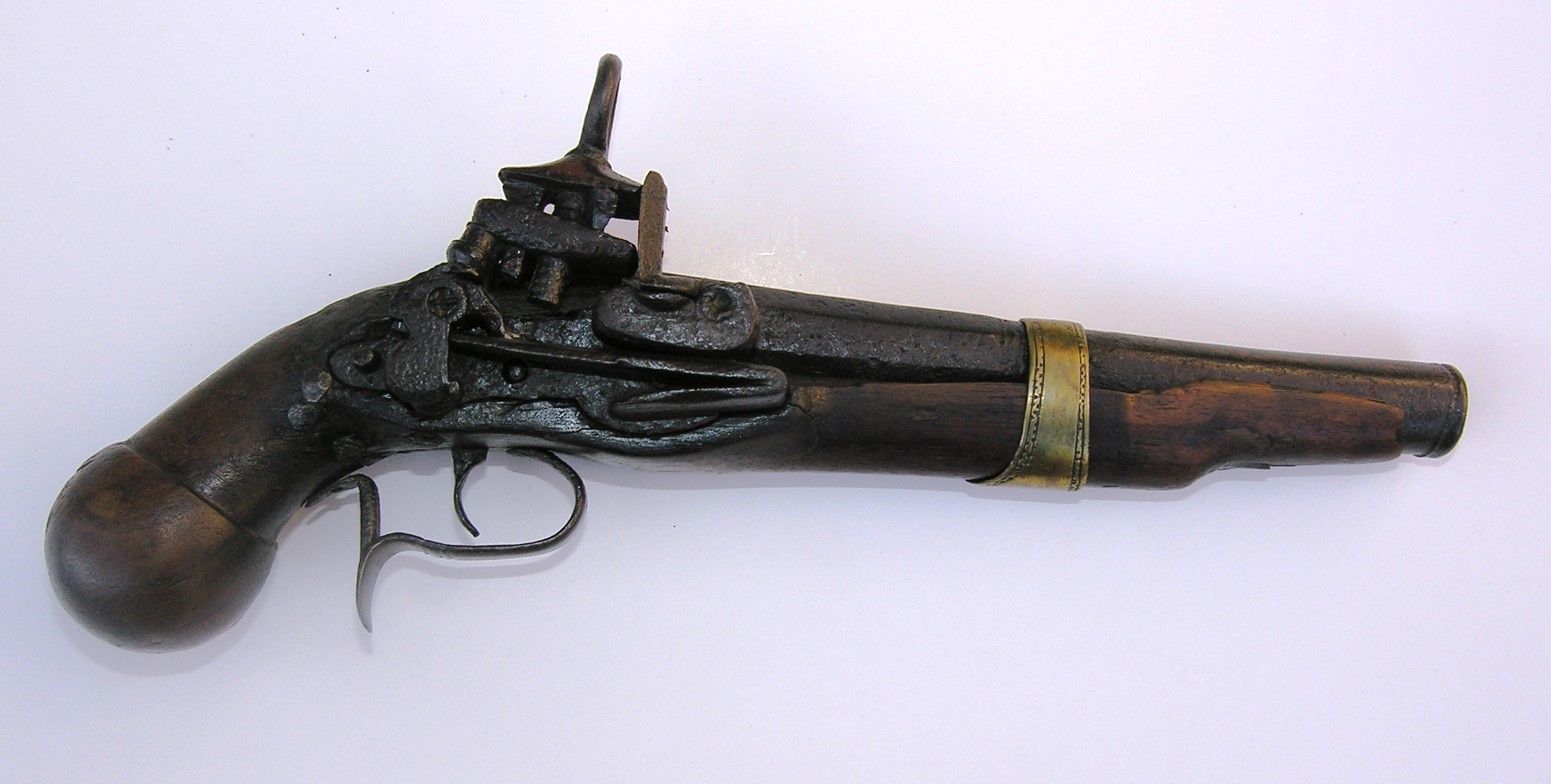 Pistola de clau de miquelet MdT 405